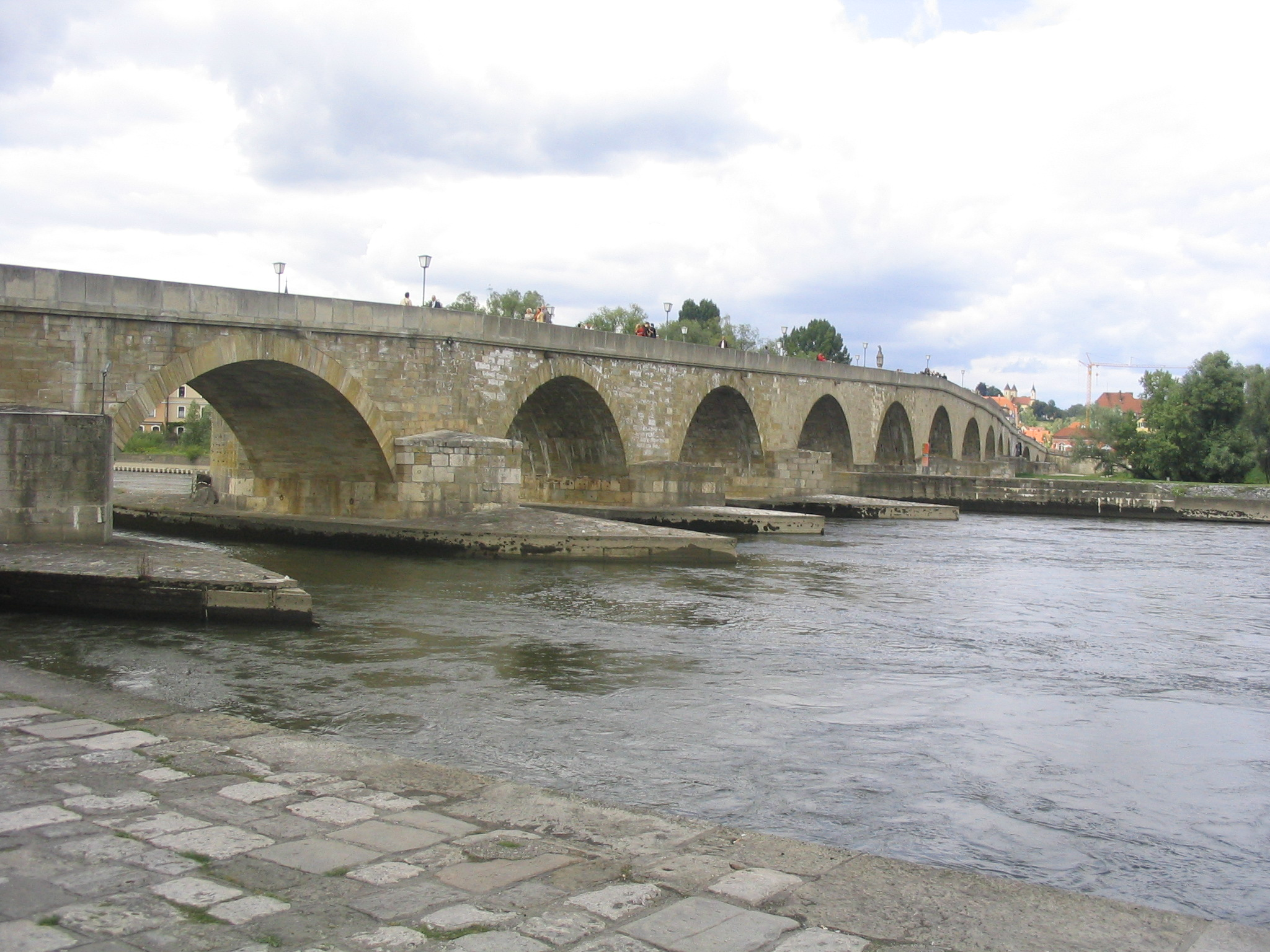 Steinerne Brücke in Regensburg, Aufgenommen am 30.07.2007 von Dr. Hagen Graebner